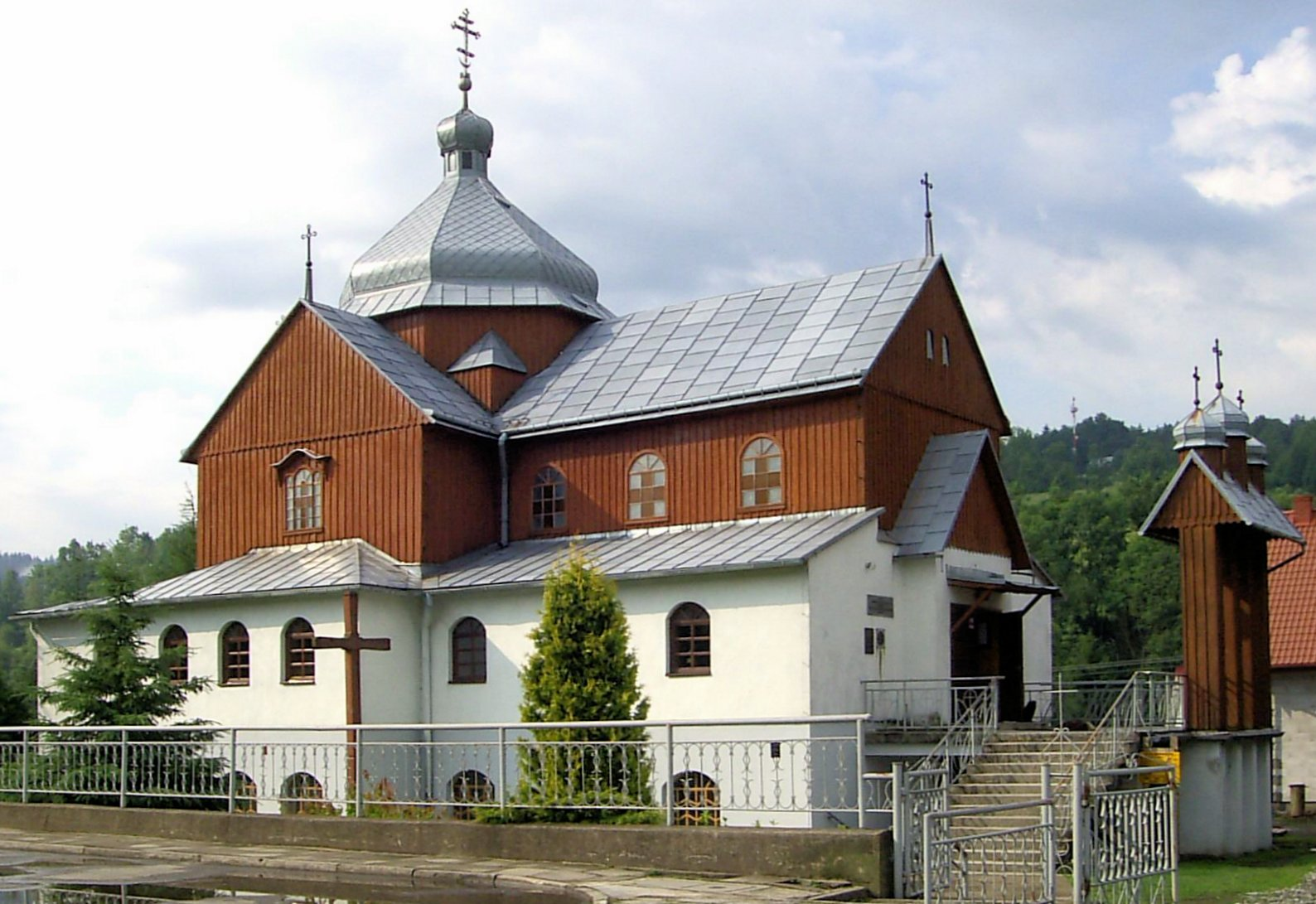 Cerkiew greckokatolicka w Komańczy